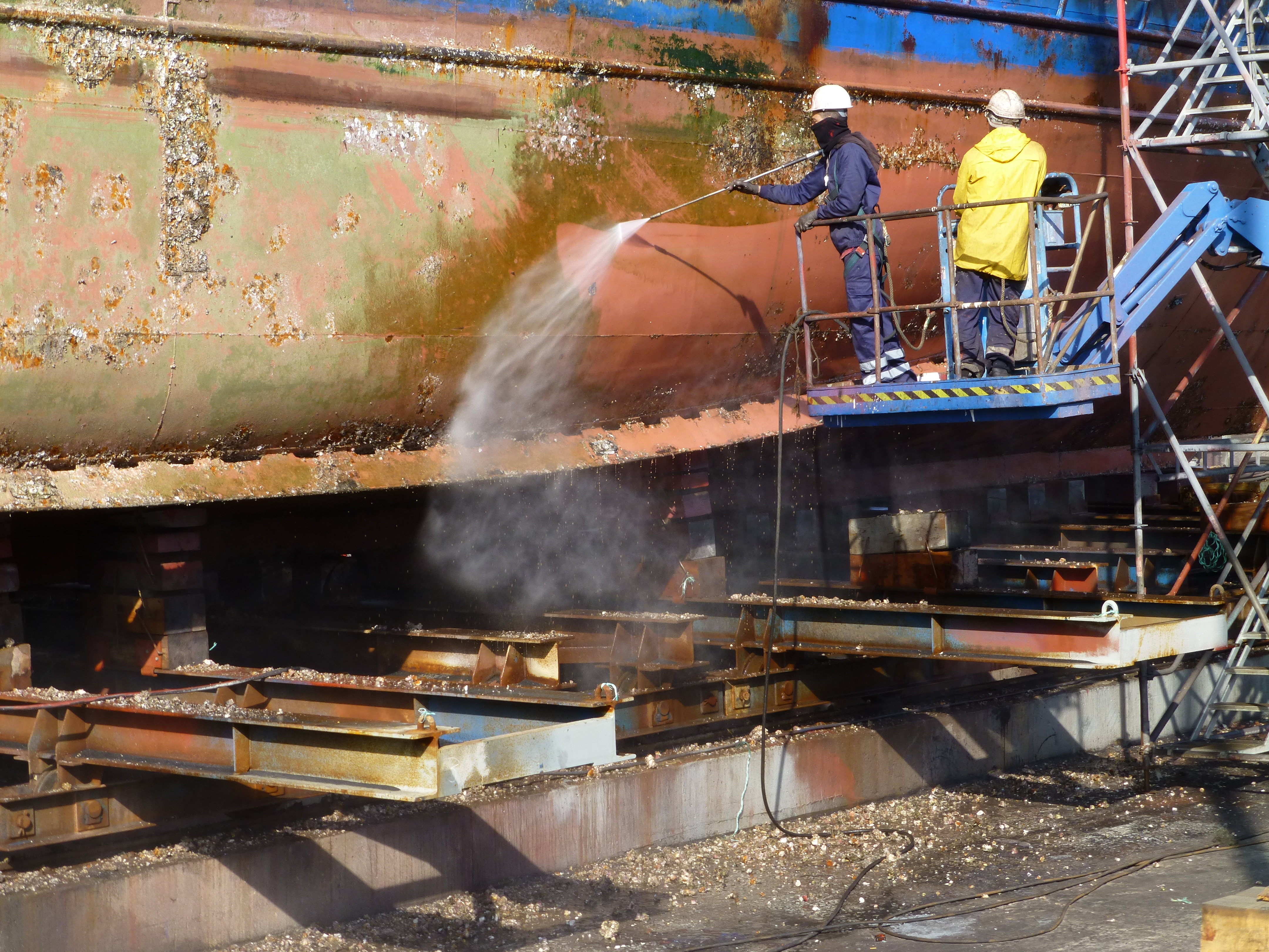 En un varadero del Puerto de La Luz y de Las Palmas (Islas Canarias, España), están limpiando el casco de un buque pesquero, con chorro de agua para eliminar pequeñas incrustaciones y algas adheridas.